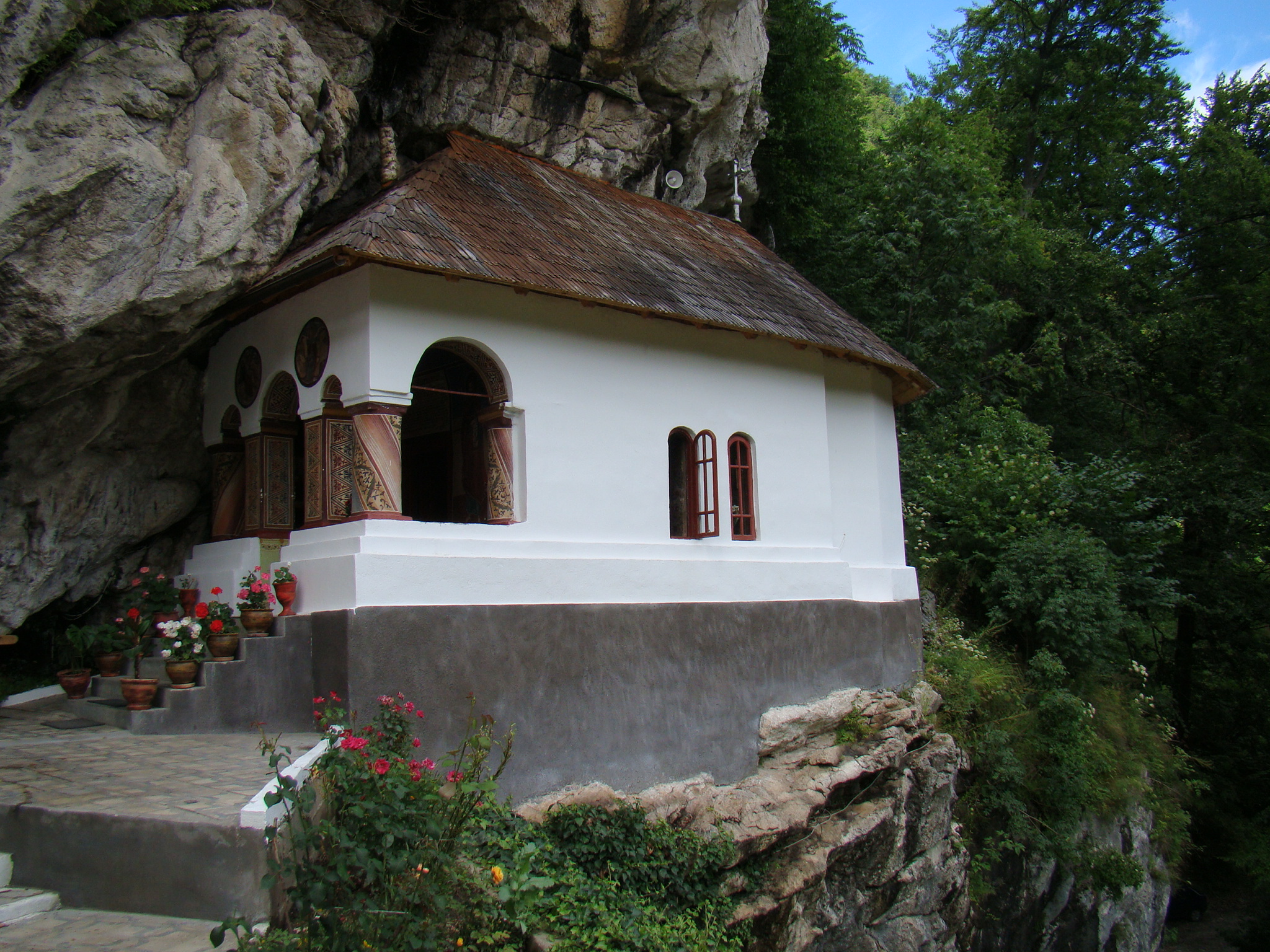 Manastirea Pahomie